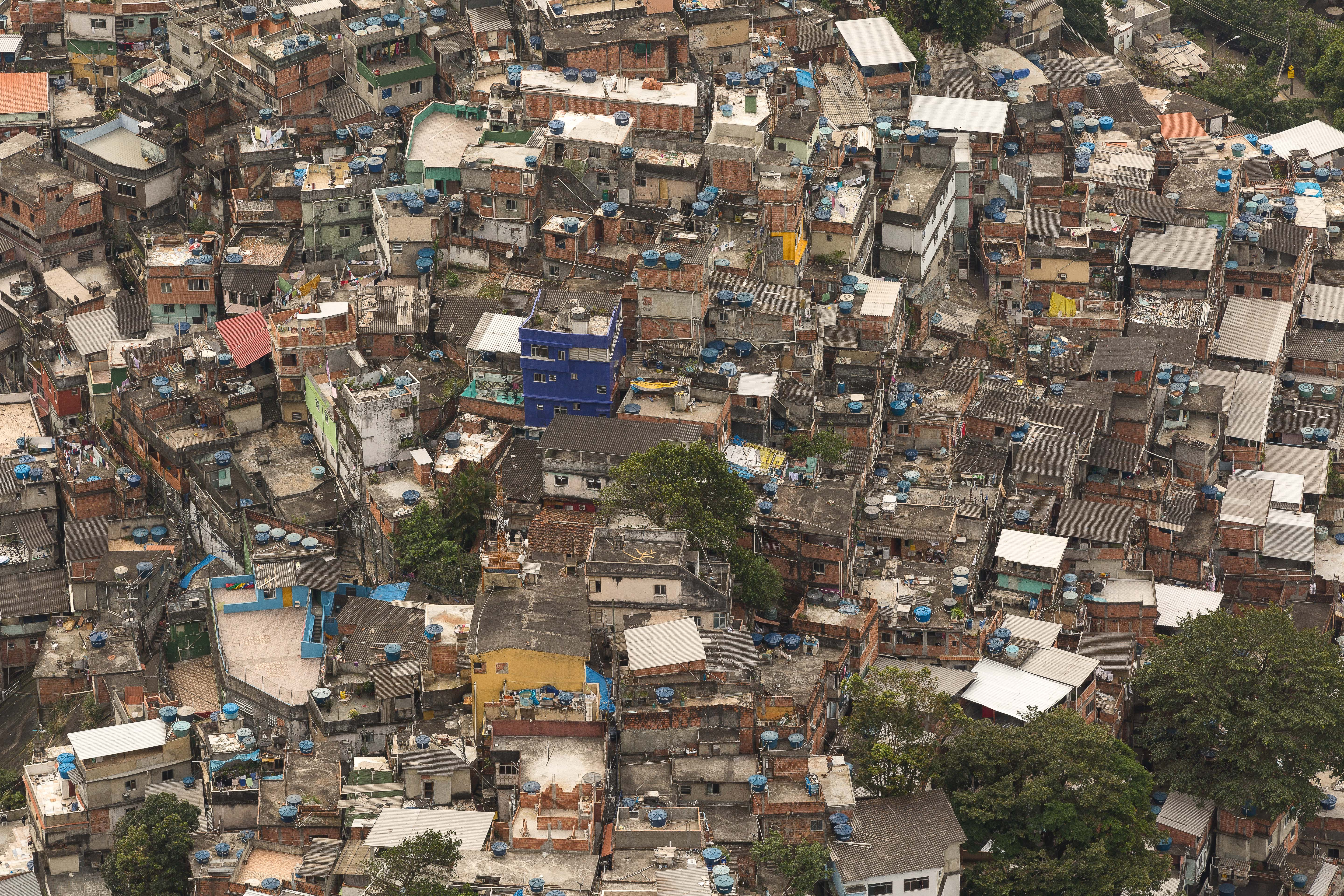 Vista aérea da favela da Rocinha, localizada na cidade do Rio de Janeiro.